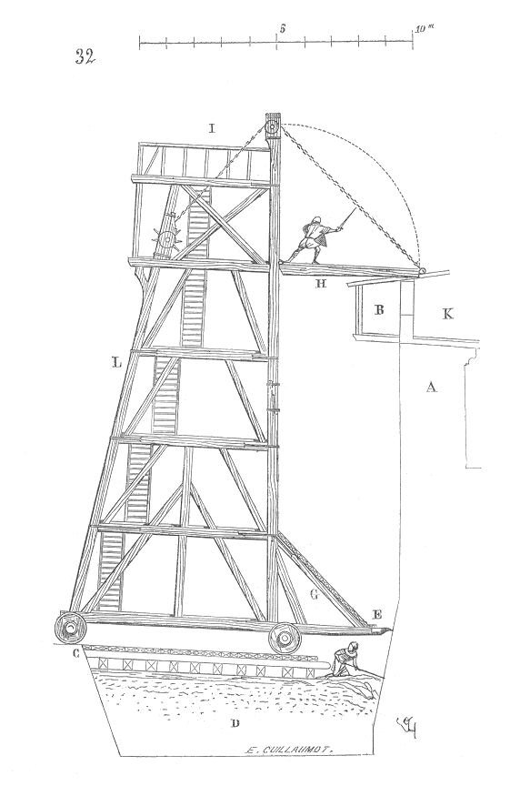 Soit (32) une muraille A qu'il s'agit de forcer. Avant tout, au moyen des projectiles lancés par les trébuchets et mangonneaux, les assiégeants ont détruit ou rendu impraticables les hourds B, ils ont comblé le fossé D et ont couvert le remblai d'un bon plancher incliné. Le beffroi, amené au point C, engagé sur ce plancher, roule de lui-même; les éperons E, dont la longueur est calculée, viennent butter contre le pied de la muraille; leurs contre-fiches G, couvertes de forts madriers, forment un chat propre à garantir les pionniers et mineurs, s'il est besoin...